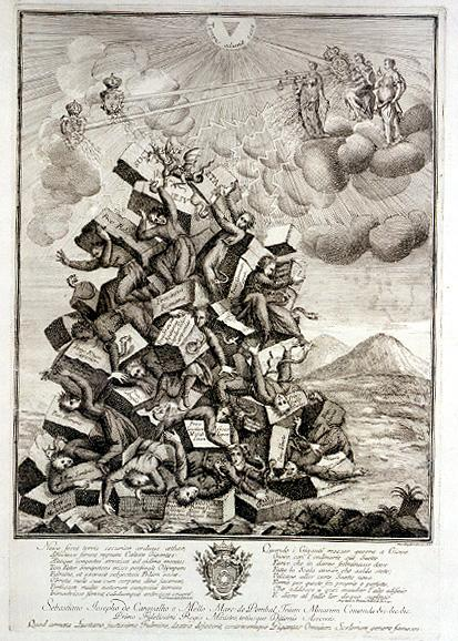 Die Auflösung des Jesuitenordens 1773: Allegorische Darstellung als Gigantomachie, gewidmet dem portugisischen Ministerpräsidenten Pombal, der zuerst gegen den Orden vorgegeangen war